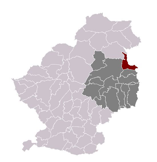 Tilloy-lez-Marchiennes dans son canton et son arrondissement